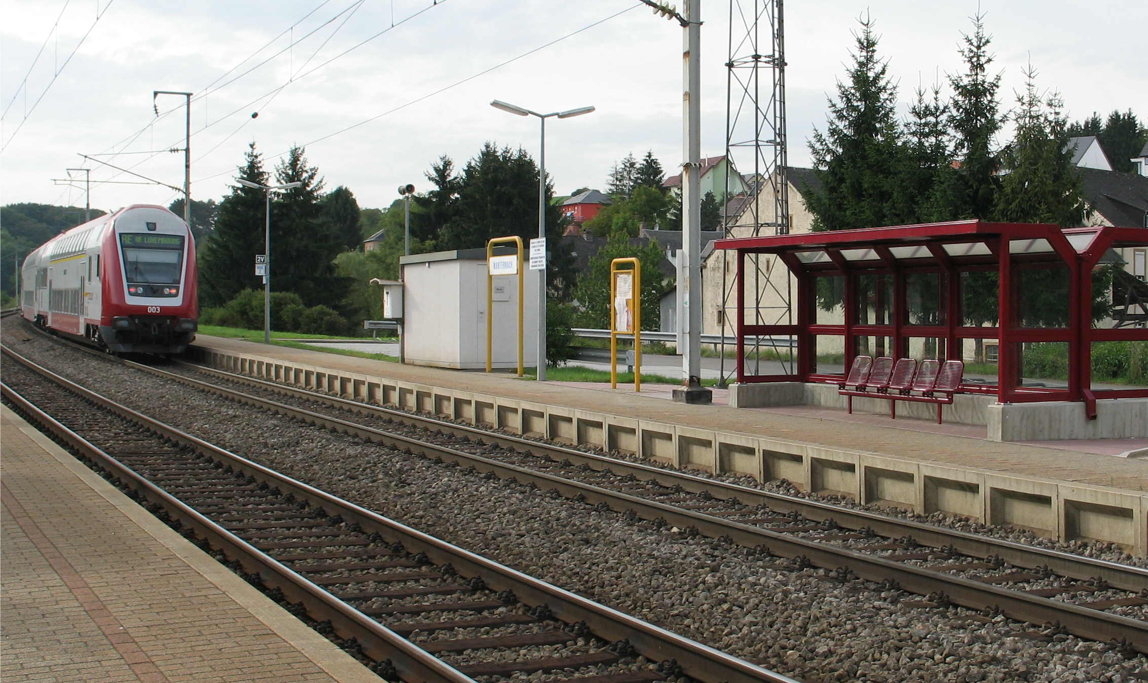 Gare zu Manternach